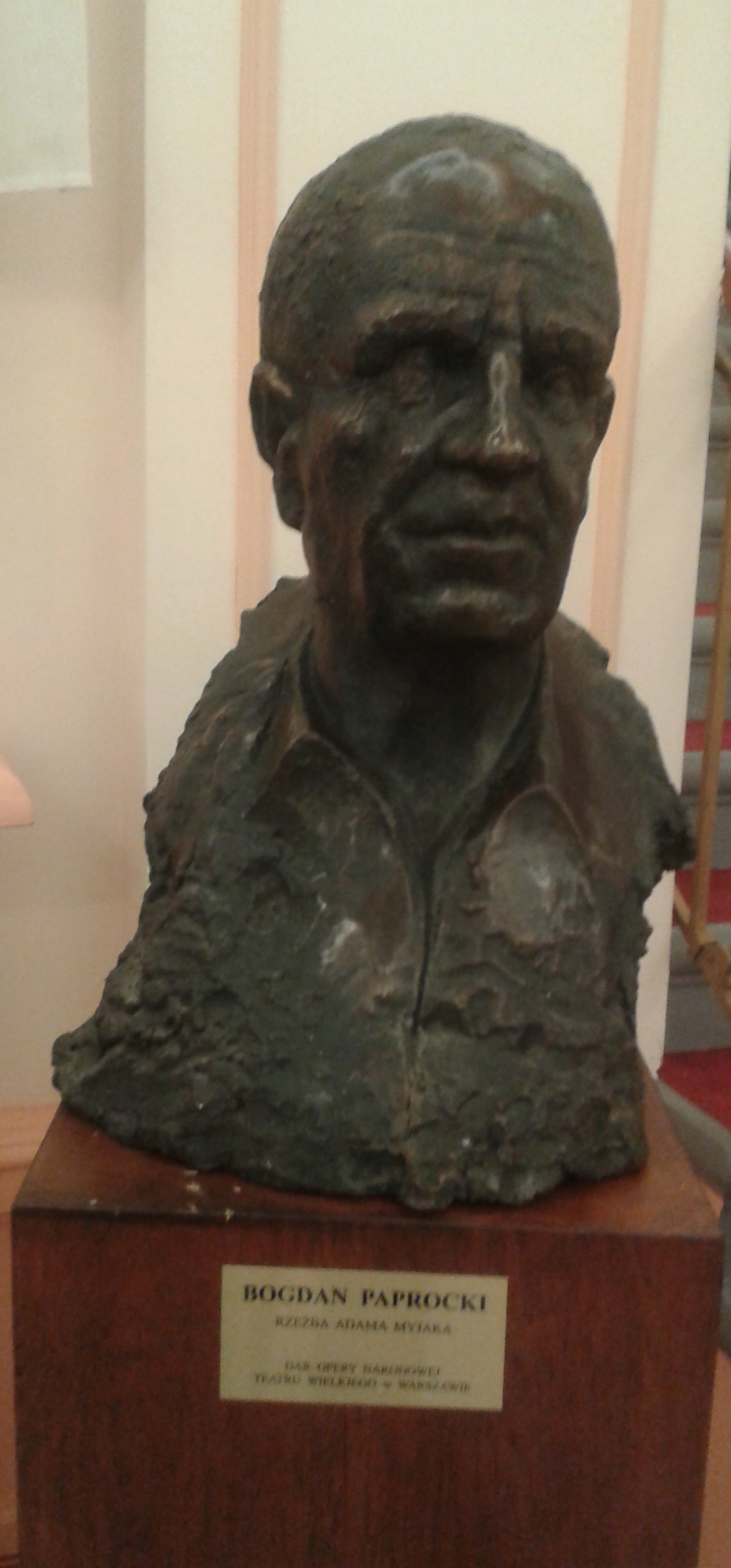 Bogdan Paprocki - polski tenor